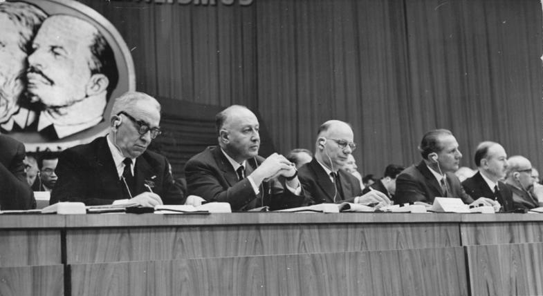 Zentralbild Kollektiv Me-At. 16.1.1963 VI. Parteitag der SED vom 15.-21.1.1963 in der Werner-Seelenbinder-Halle in Berlin (2.Tag). UBz.: Im Präsidium (v.l.n.r.): der Stellvertretende Generalsekretär der KP Italiens, Luigi Longo, das Mitglied des Politbüros des ZK der SED, Alber Norden, der Stellvertretende Generalsekretär der KP Frankreichs, Waldeck-Rochet, das Mitglied des Politbüros des ZK der SED, Erich Honecker, der Sekretär des ZK der KPdSU, Boris Ponomarjow, und das Mitglied des Politbüros des ZK der SED, Friedrich Ebert. (Heilig)